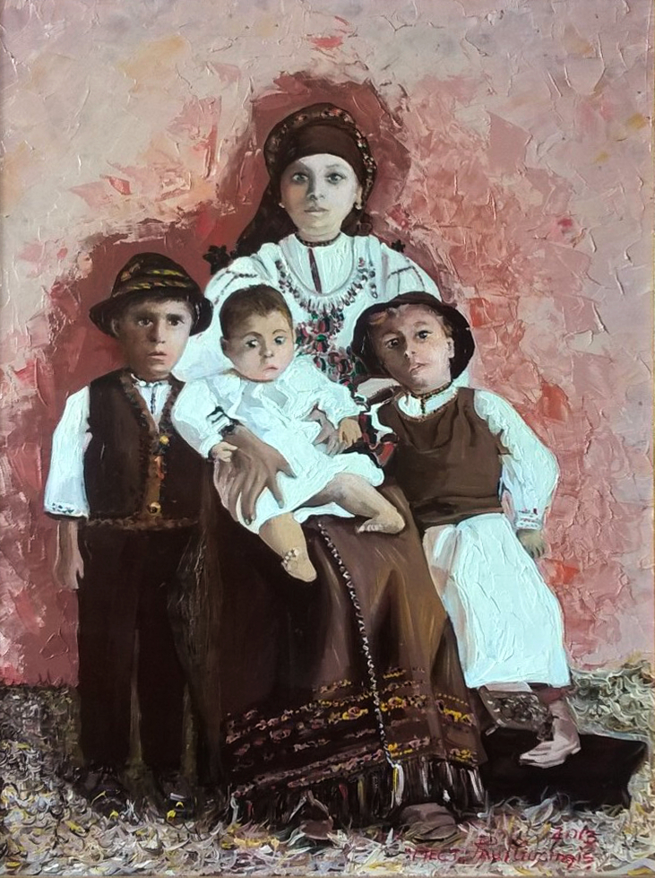 Familie din Racovița, Sibiu. Tablou de familie (Ana lu' Săbăduș cu copiii Viorel, Dionisie(Nisă), Dionisie(decedat la vârsta de 6 ani)), realizat de pictorul bucureștean Paul Mecet.